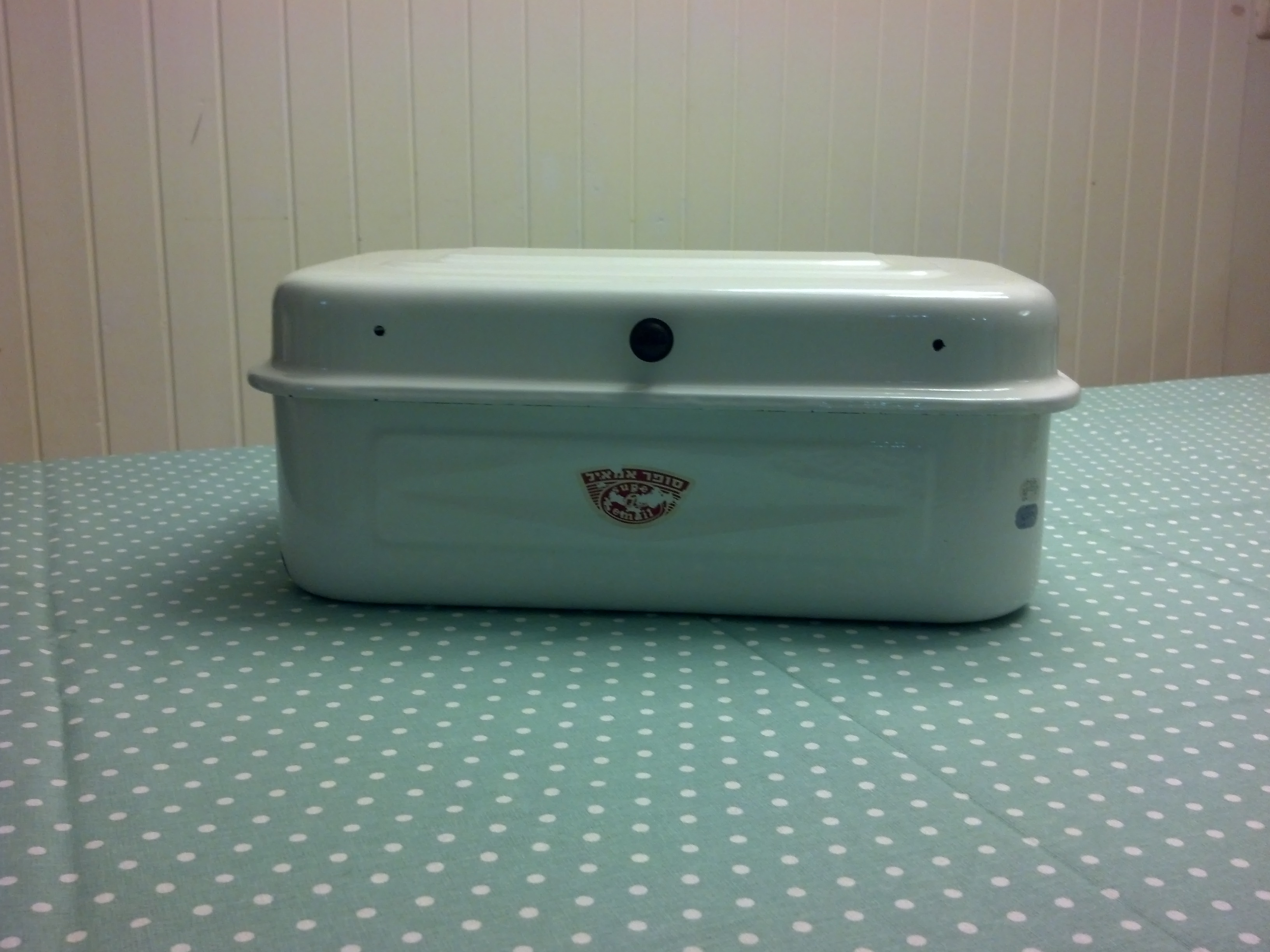 ארגז לחם מצופה באמאיל